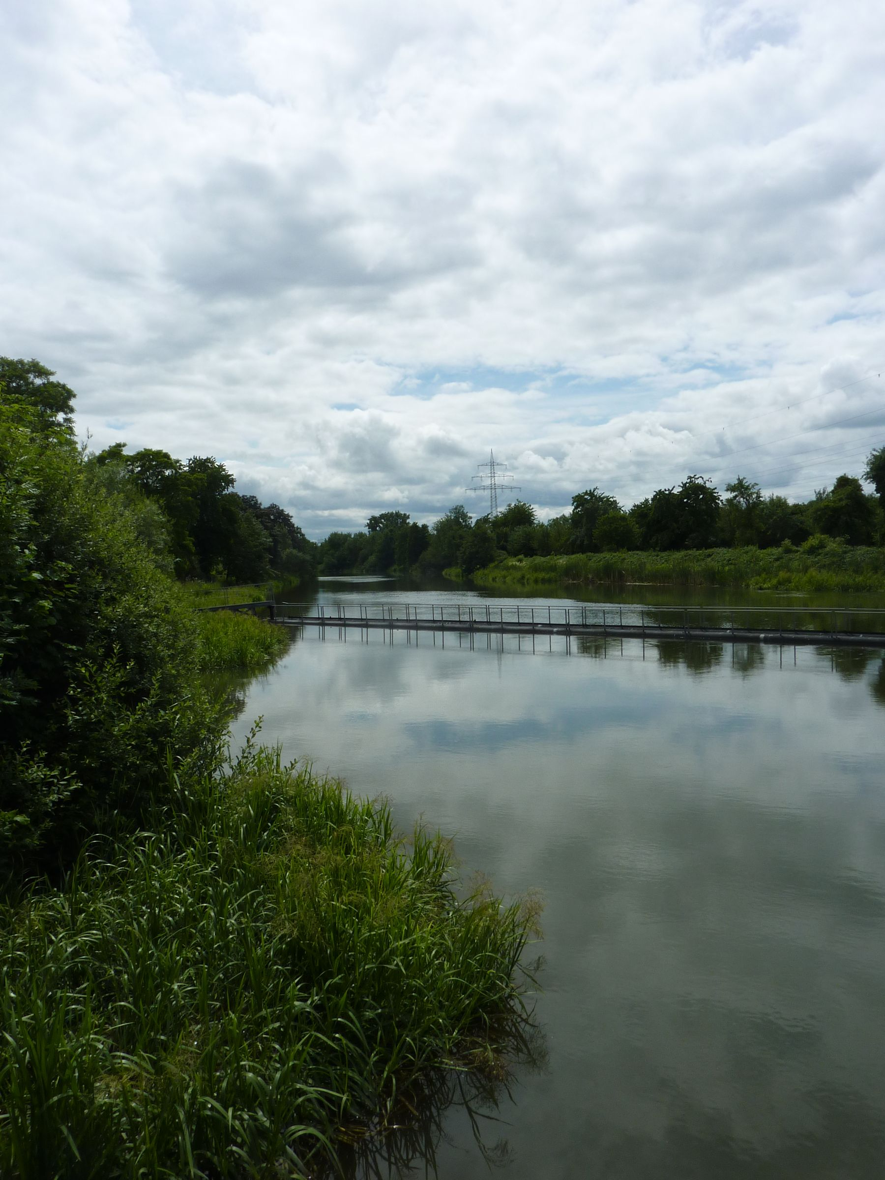 Wasserkraftwerk Pleidelsheim